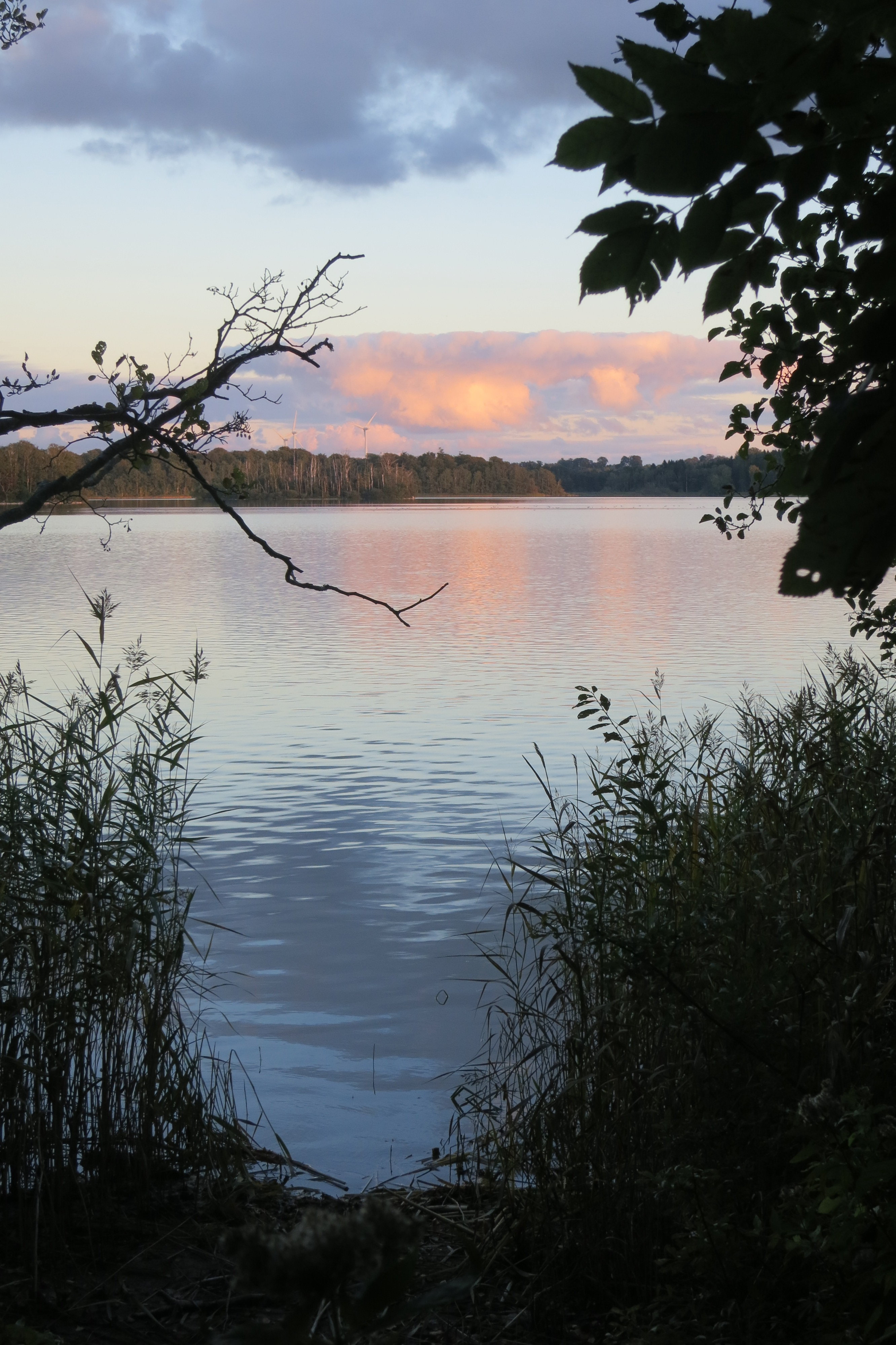 Snogeholmssjön